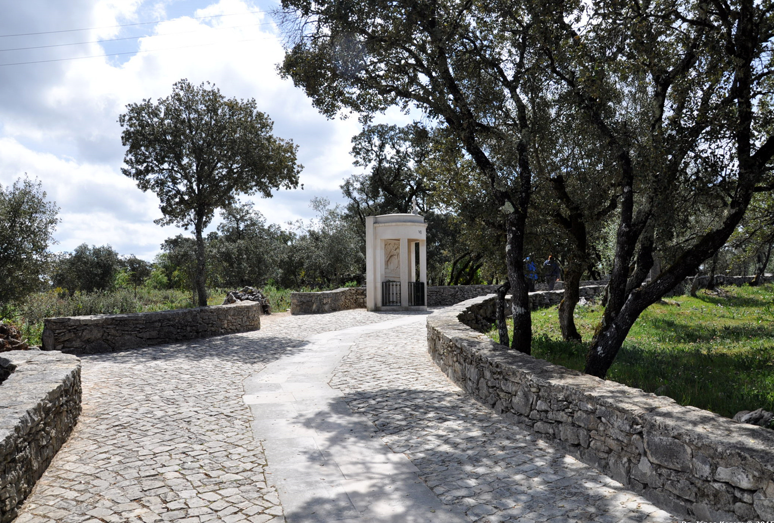 Calváro Hungaro Fatima 0583